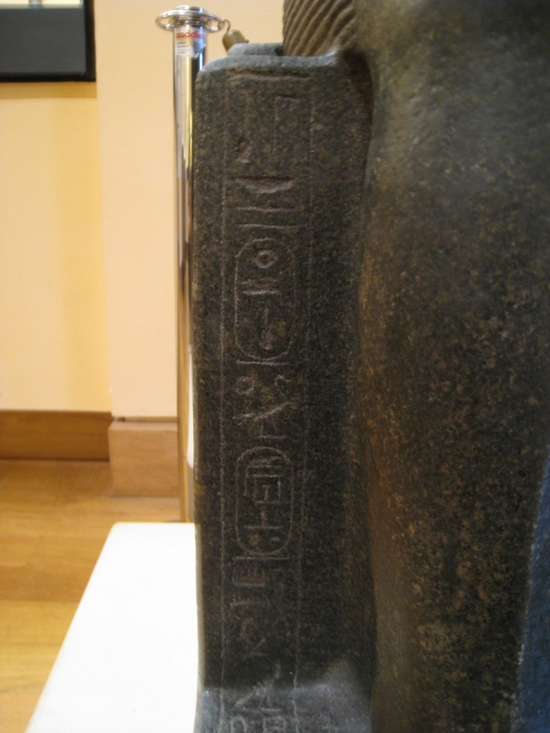 Inscription avec les cartouches de Sobekhotep IV (kha-nefer-ra Sobek-hotep) - XIIIe dynastie égyptienne - Musée du Louvre